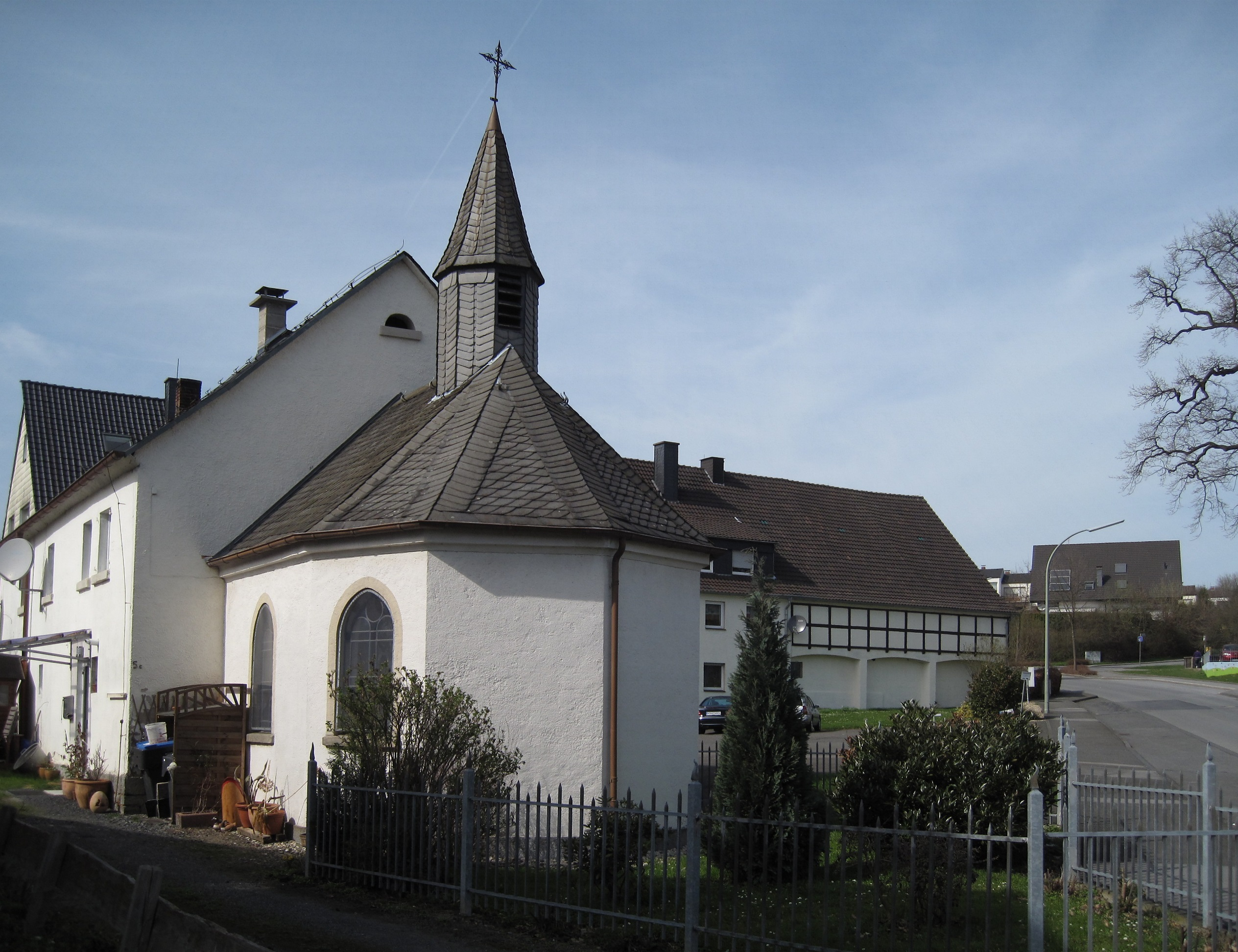 Unter Denkmalschutz stehende „Hofkapelle Bienstein“ (erbaut 1885) in Arnsberg-Niedereimer, Zur Friedrichshöhe.